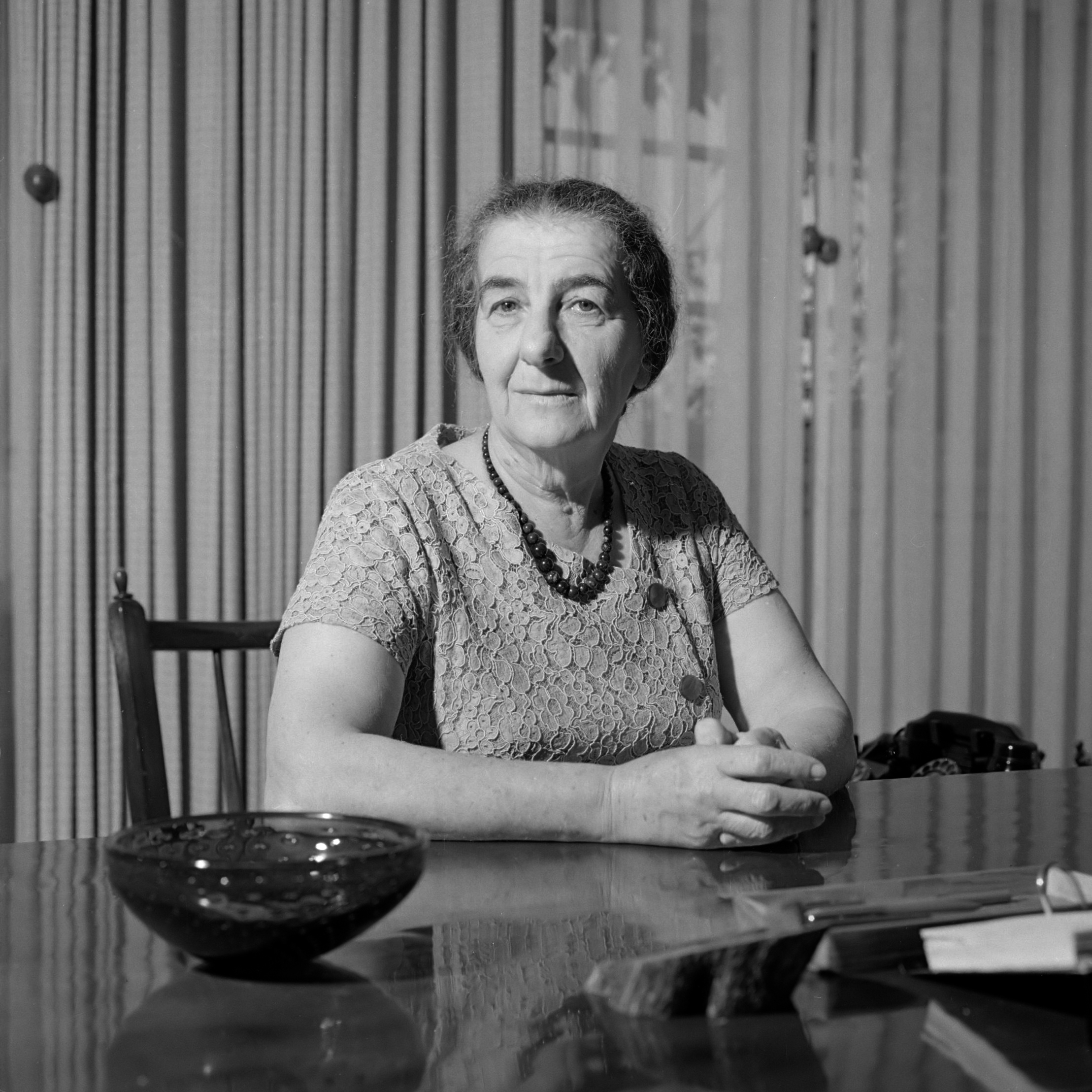 Golda Meir, minister van buitenlandse zaken van Israel 1964